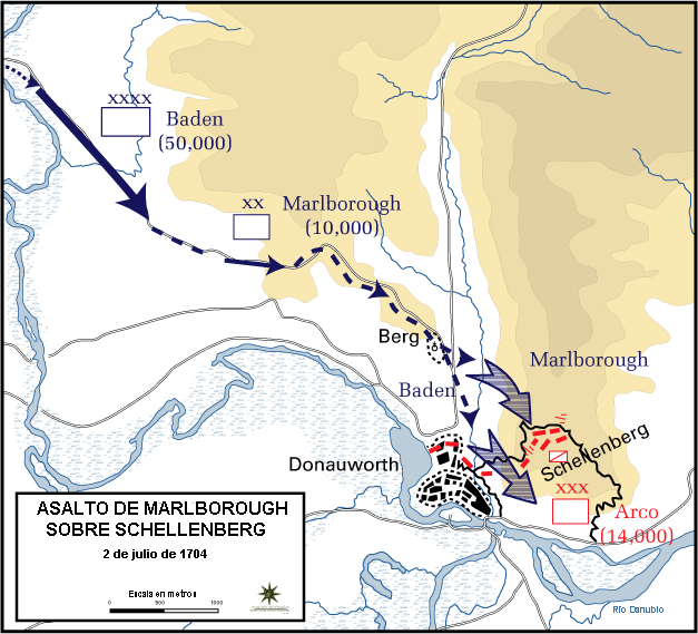 Asalto de Marlborough sobre Schellenberg, el 2 de julio de 1704